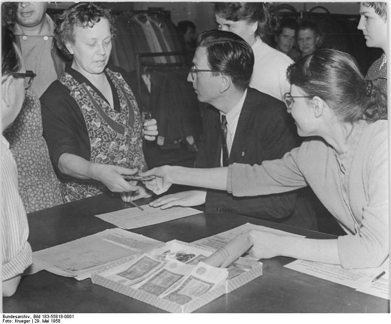 Berlin, VEB Treffmodelle, Auszahlung von Zuschlägen Zentralbild Krueger Froe-L 29.5.58 Auszahlung der Lohnzuschläge im VEB Treffmodelle Berlin. Wie in allen Großbetrieben unserer Republik, so wurde auch in diesem Betrieb die Auszahlung der Zuschläge entsprechend dem Gesetz über die Abschaffung der Lebensmittelkarten vorgenommen. Am 29.5.1958 wurden in dem Werk cirka 25.000 DM ausgezahlt. UBz: Der technische Direktor Kupper (Mitte) hilft ebenfalls mit, das Lohnbüro bei seiner zusätzlichen Arbeit zu unterstützen.